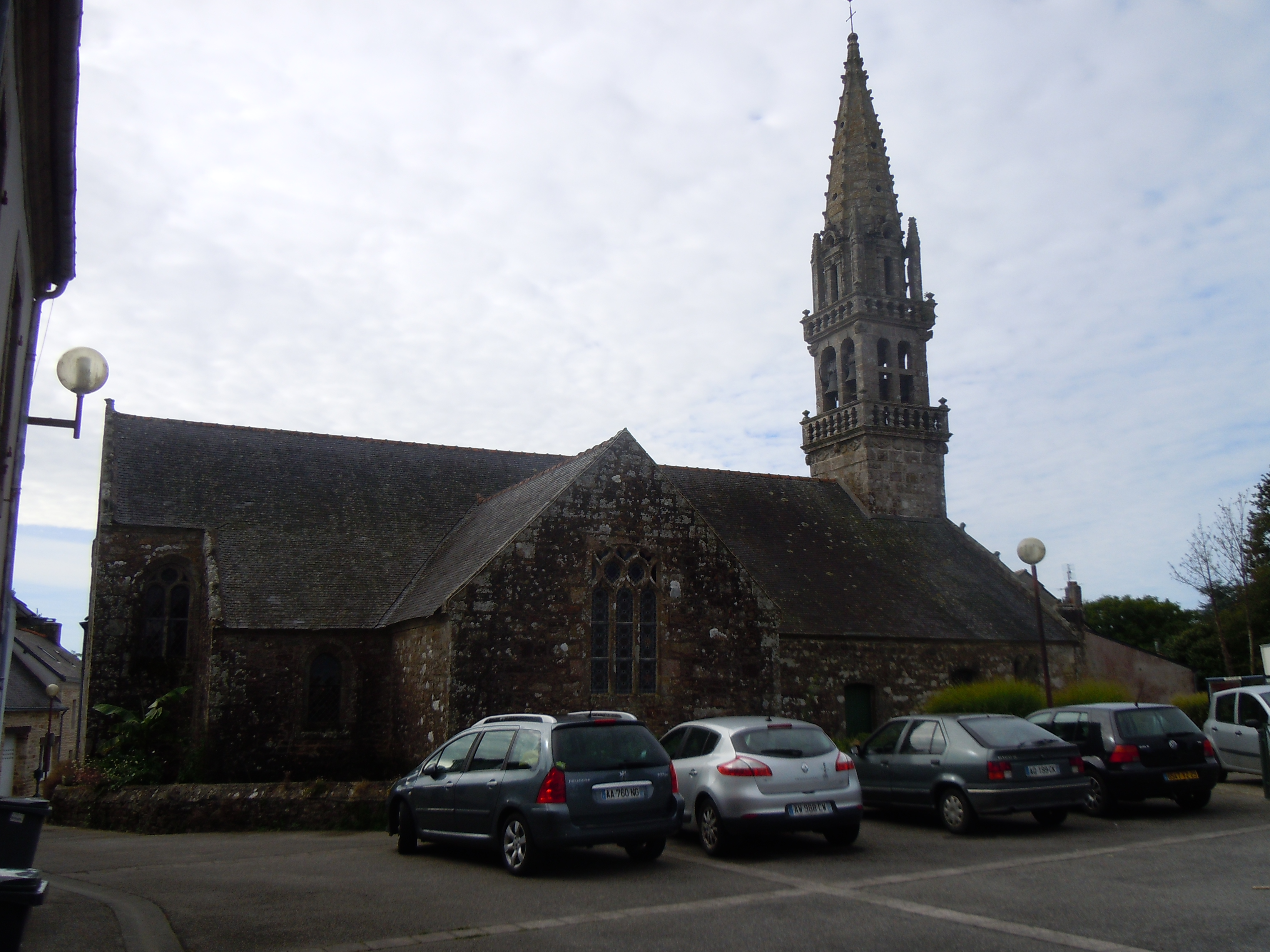 façade nord de l'église Saint-Cornély de Tourch (Finistère)